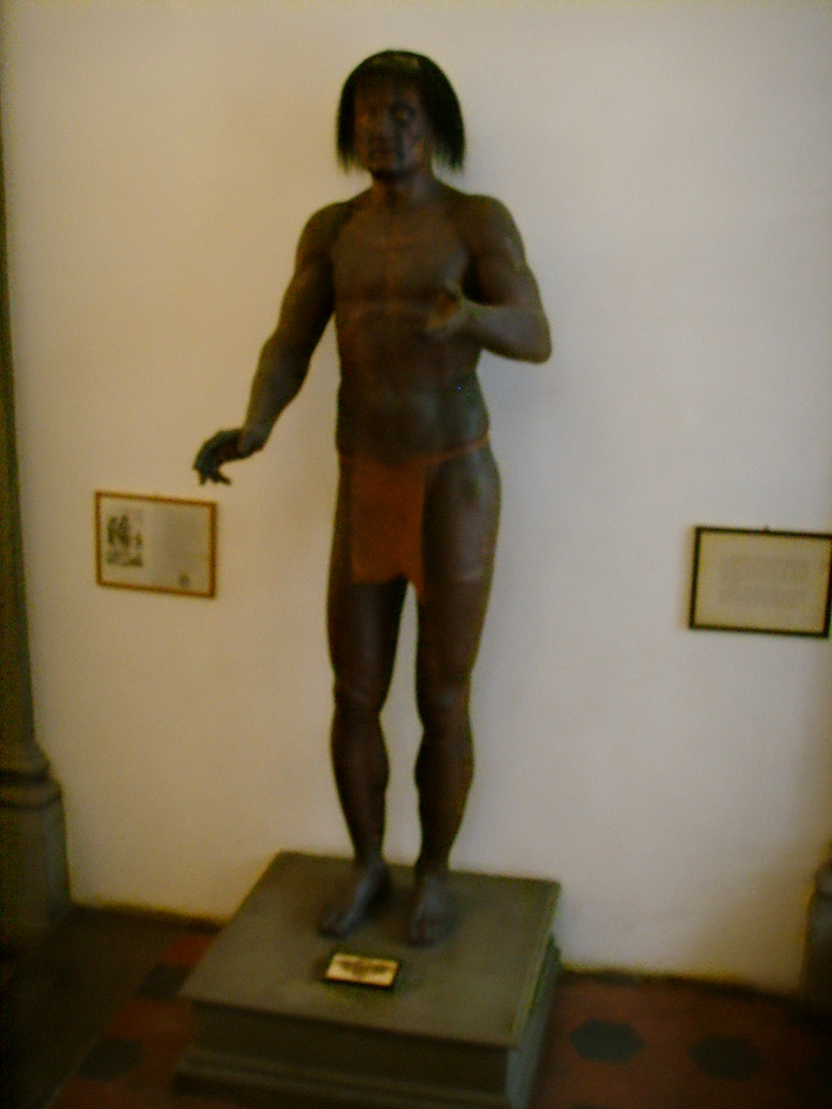 Museo antropologico, patagone 02